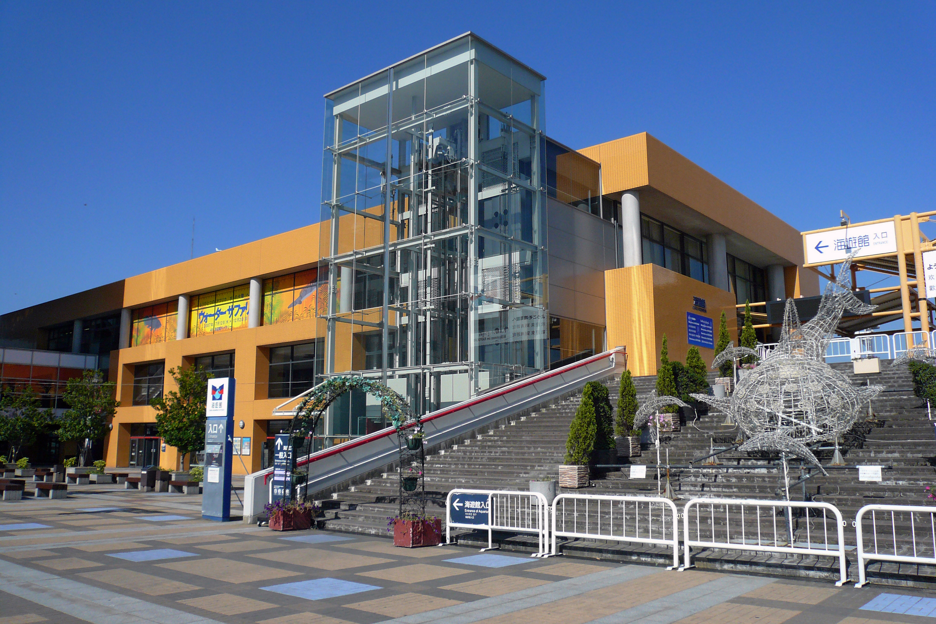 Osaka Aquarium KAIYUKAN (Ring of Fire Aquarium) in Osaka, Osaka prefecture, Japan